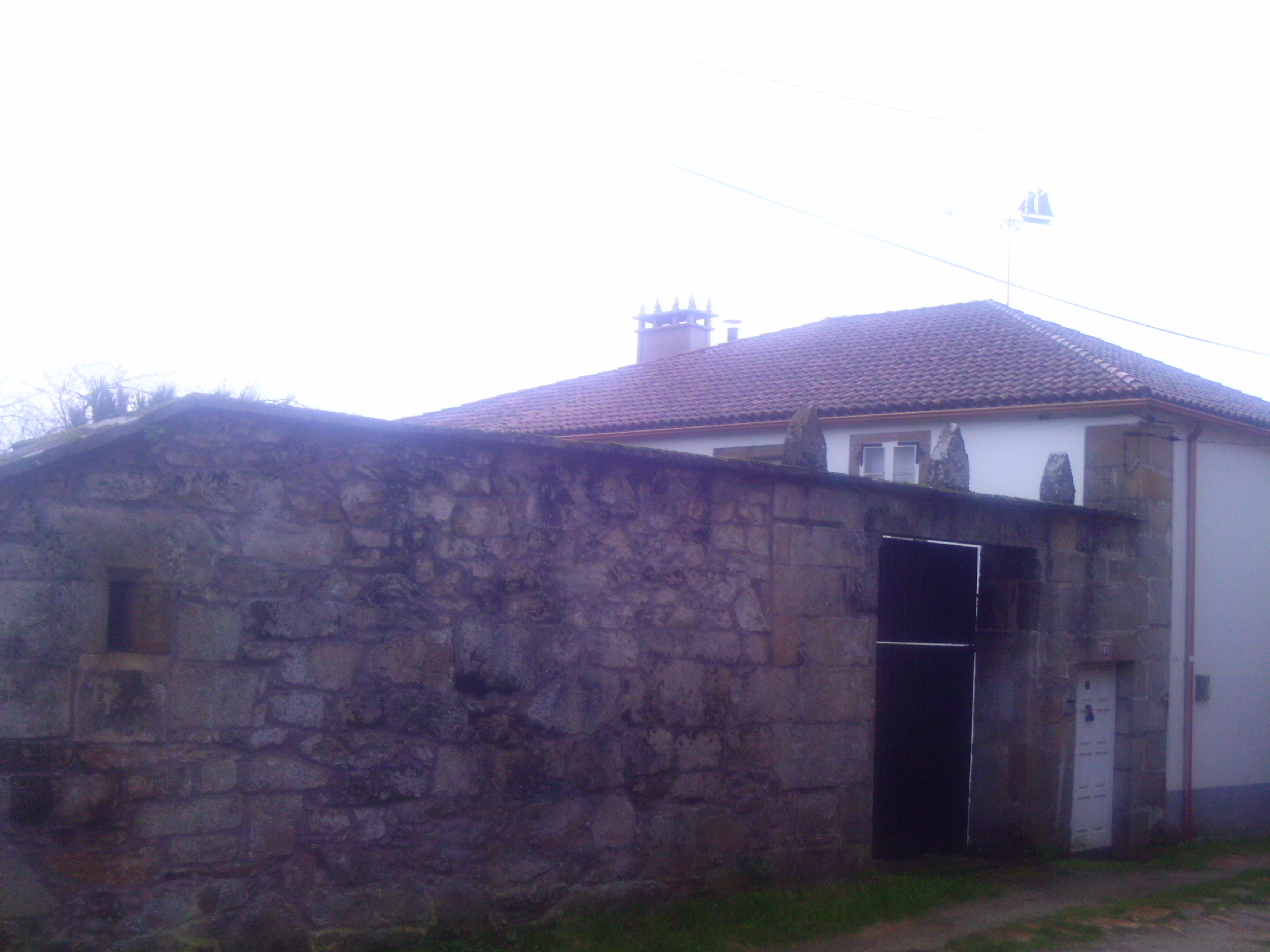 Esta é a Casa de Martinez de 1793, situada no Foxo, no concello, atópase preto da outra Casa Martinez de 1793, situada en Margaride, tamén no concello de Silleda.